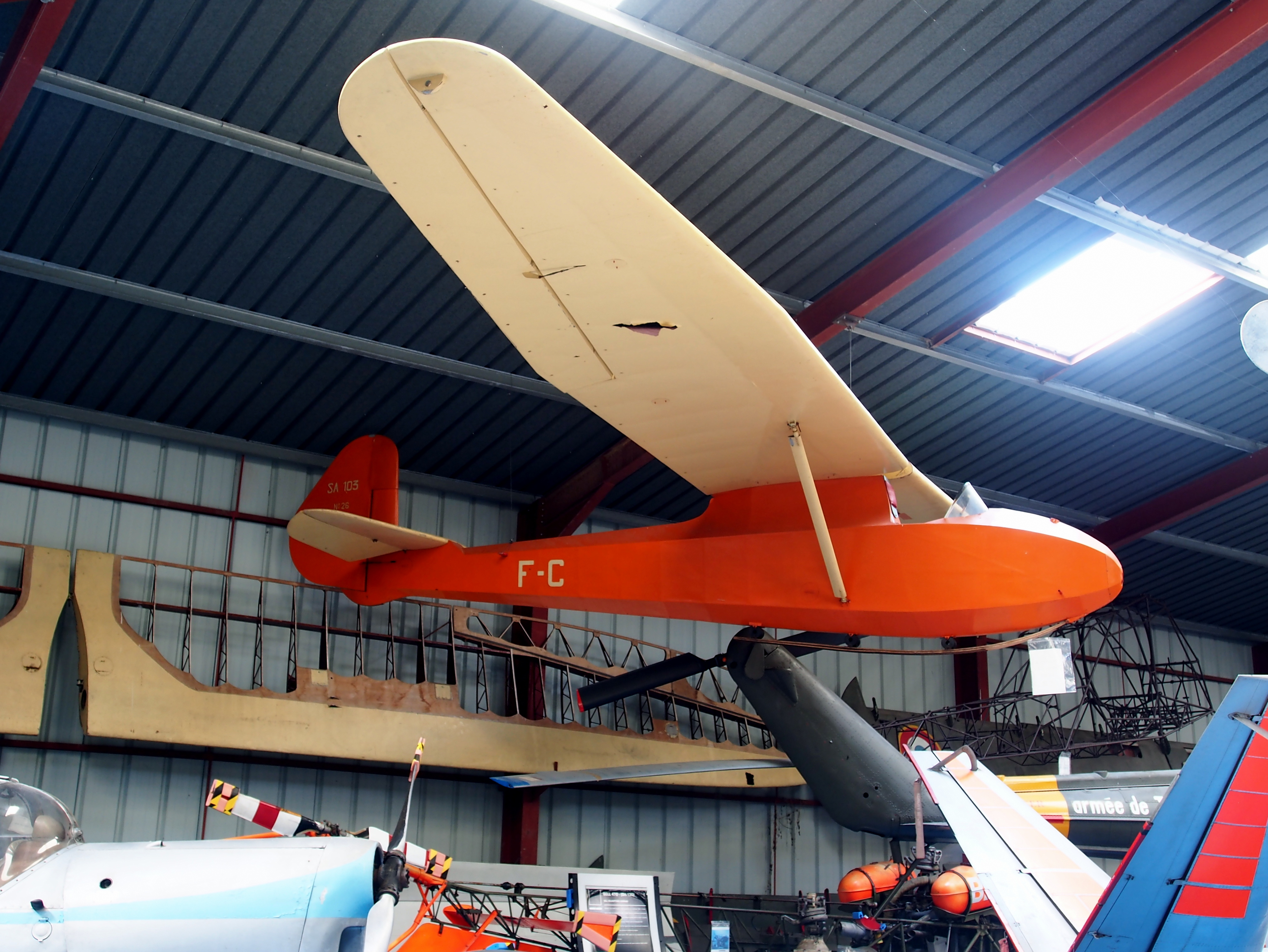 Photographed at the Musée de l'Epopée de l'Industrie et de l'Aéronautique, Albert, France.